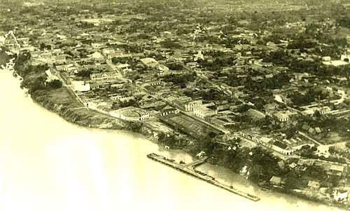 Fotografía antigua de Iquitos que data posiblemente desde 1900, durante la fiebre del caucho.